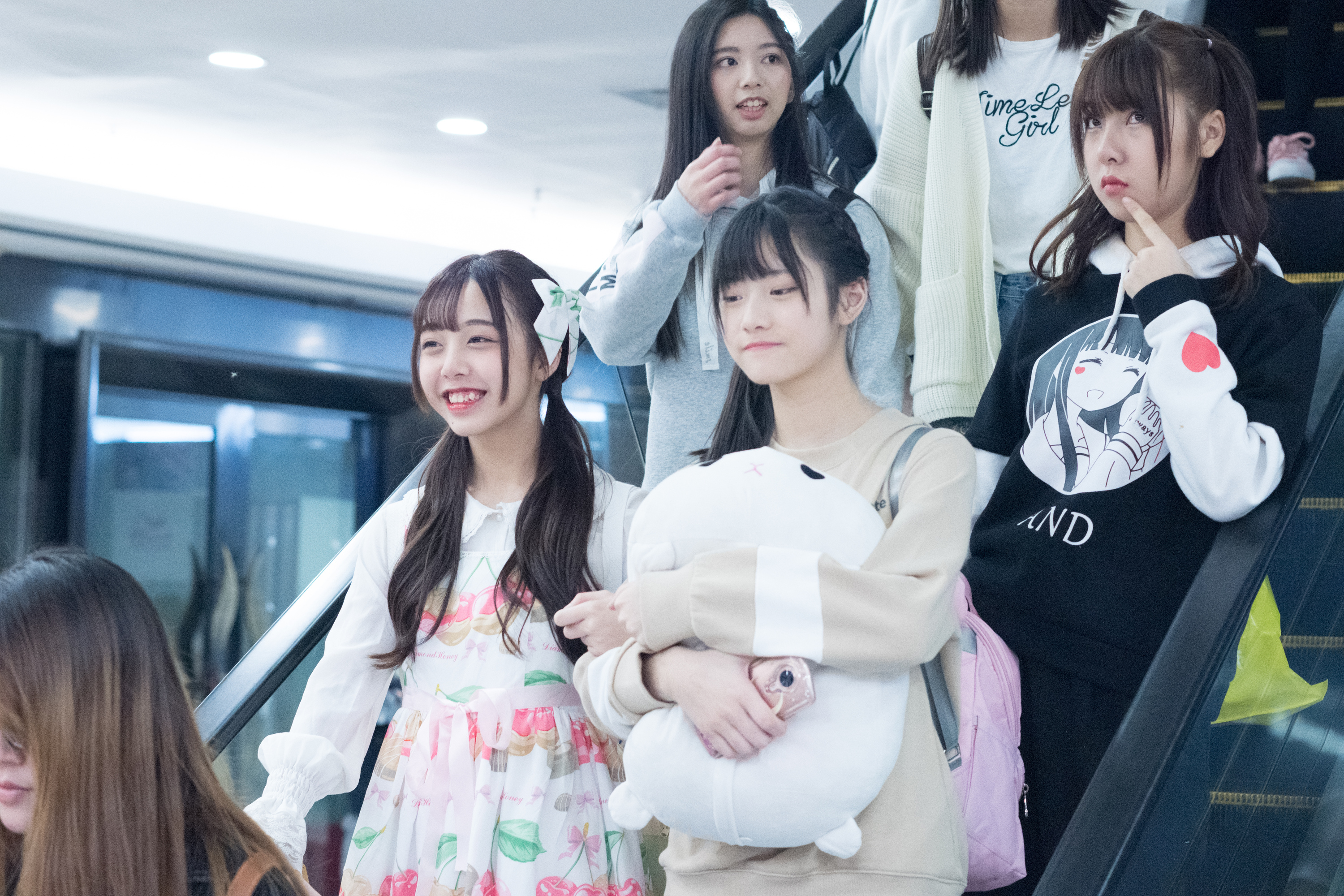 20171203——GNZ48《偶像研究计划》公演送车